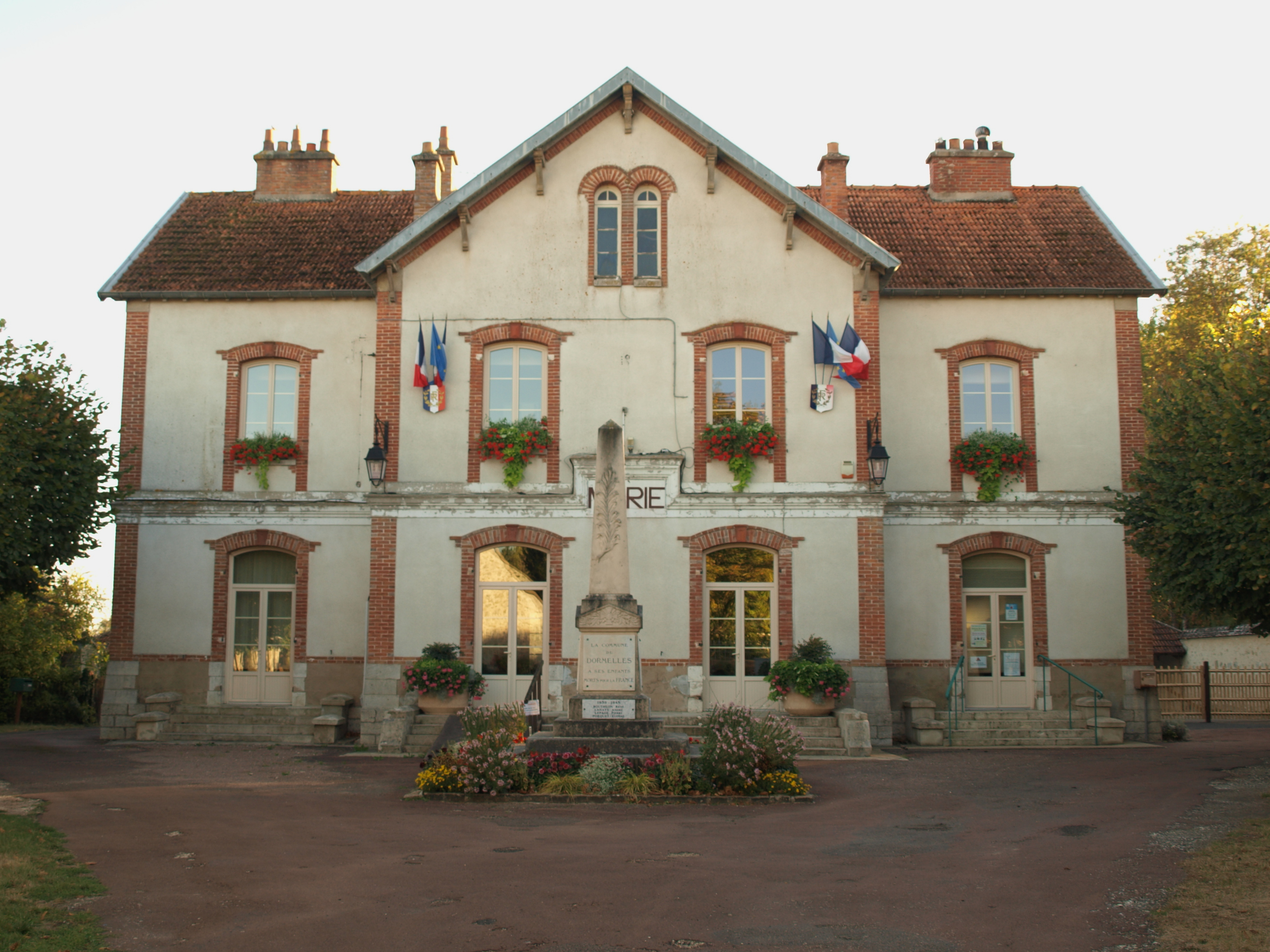 Mairie de Dormelles (Seine-et-Marne, France)